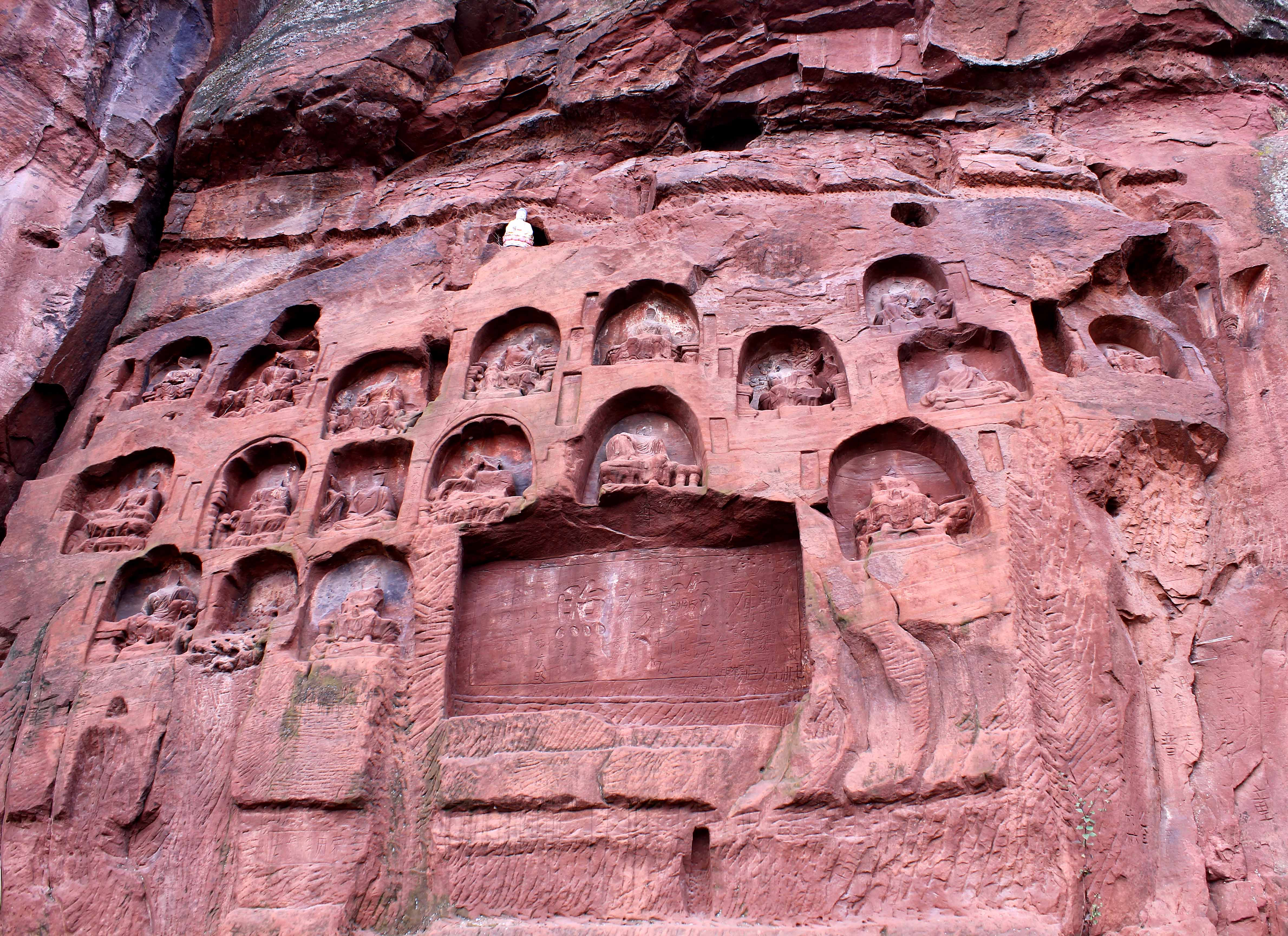 安宁法华寺东岩上雕刻的十八罗汉，雕像都没有头，为文革时破坏